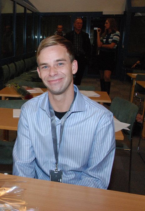 Thor Erik Forsberg